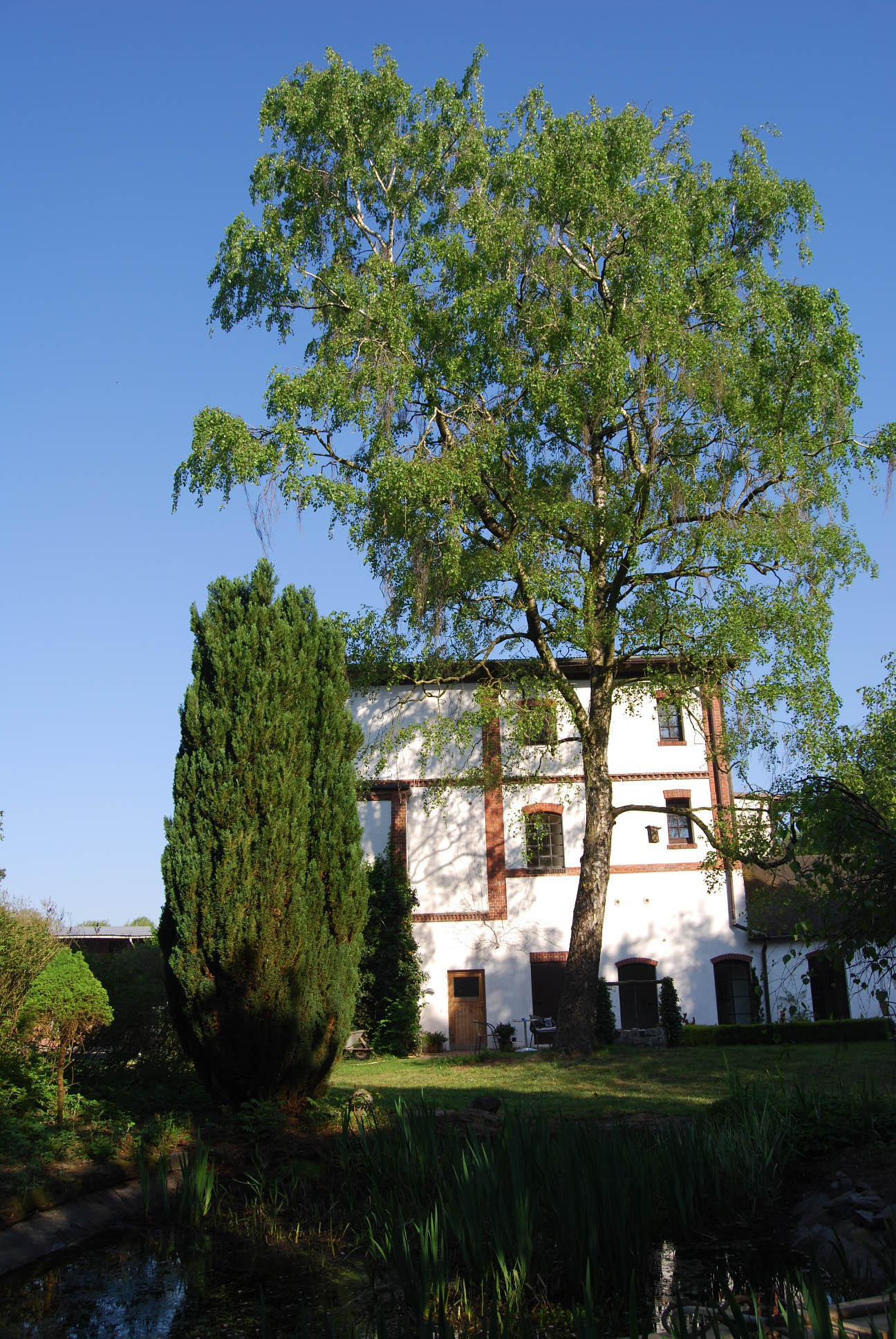 Karlshof